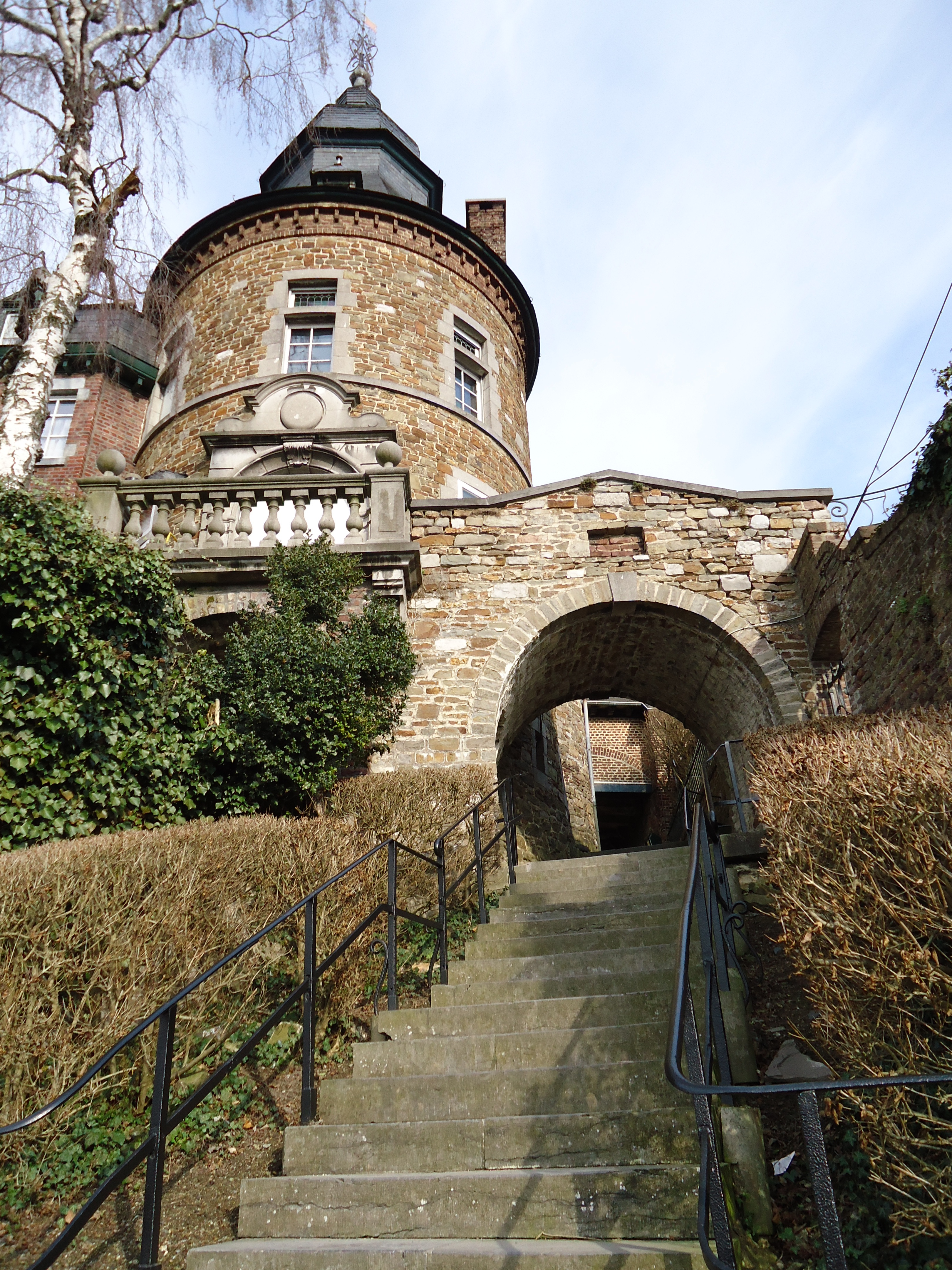 Vue depuis l'escalier de la poterne à Dalhem